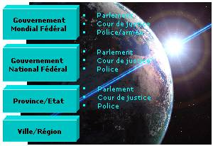 image créée à partir de l'image de l'article "World governemnt" de Wiki anglais et de l'article allemand correspondant